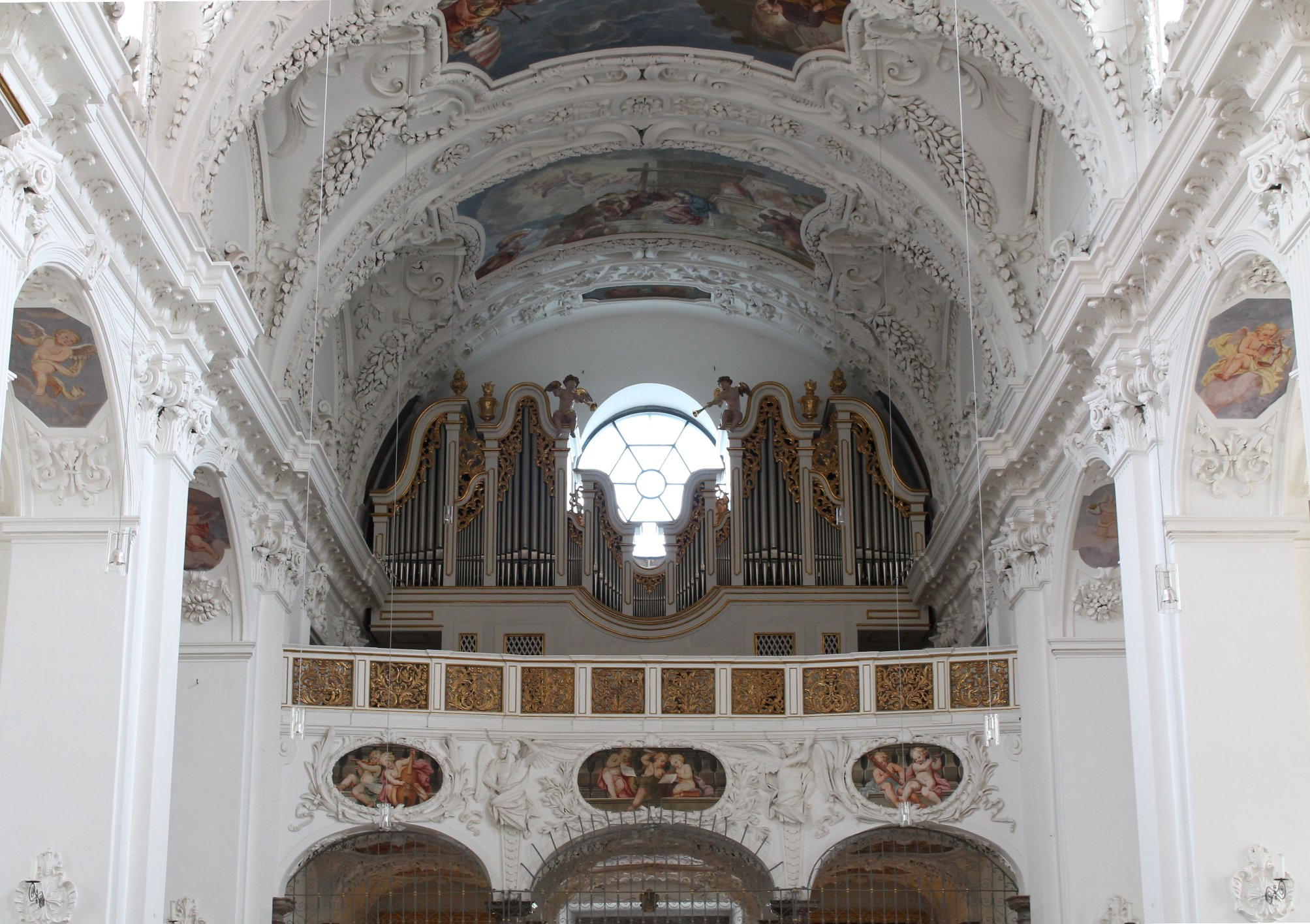 Orgel der Klosterkirche Tegernsee (1980, Georg Jann, III/33)